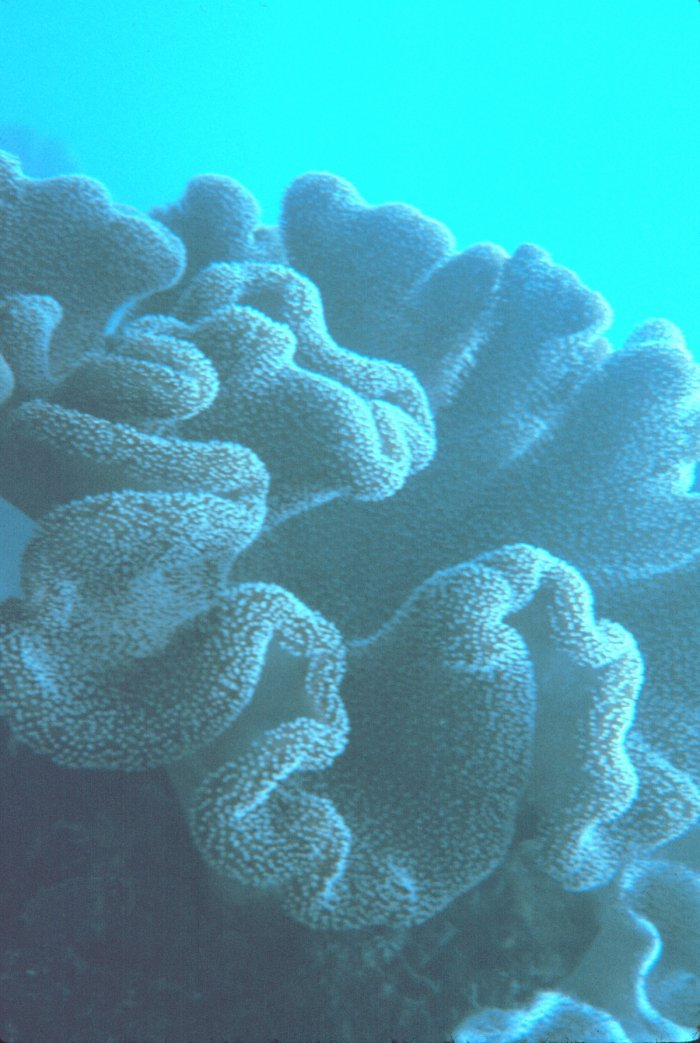 Public-Domain-Bilde von (NOAA) National Oceanic and Atmospheric Administration. Image ID: reef0014, The Coral Kingdom Collection Location: Truk Lagoon Reef (Chuuk) Photo Date: July 1974 Photographer: Dr. James P. McVey, NOAA Sea Grant Program